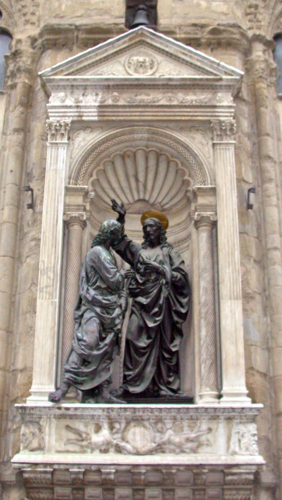 Tabernacolo dell'arte della Mercatanzia, con San Tommaso